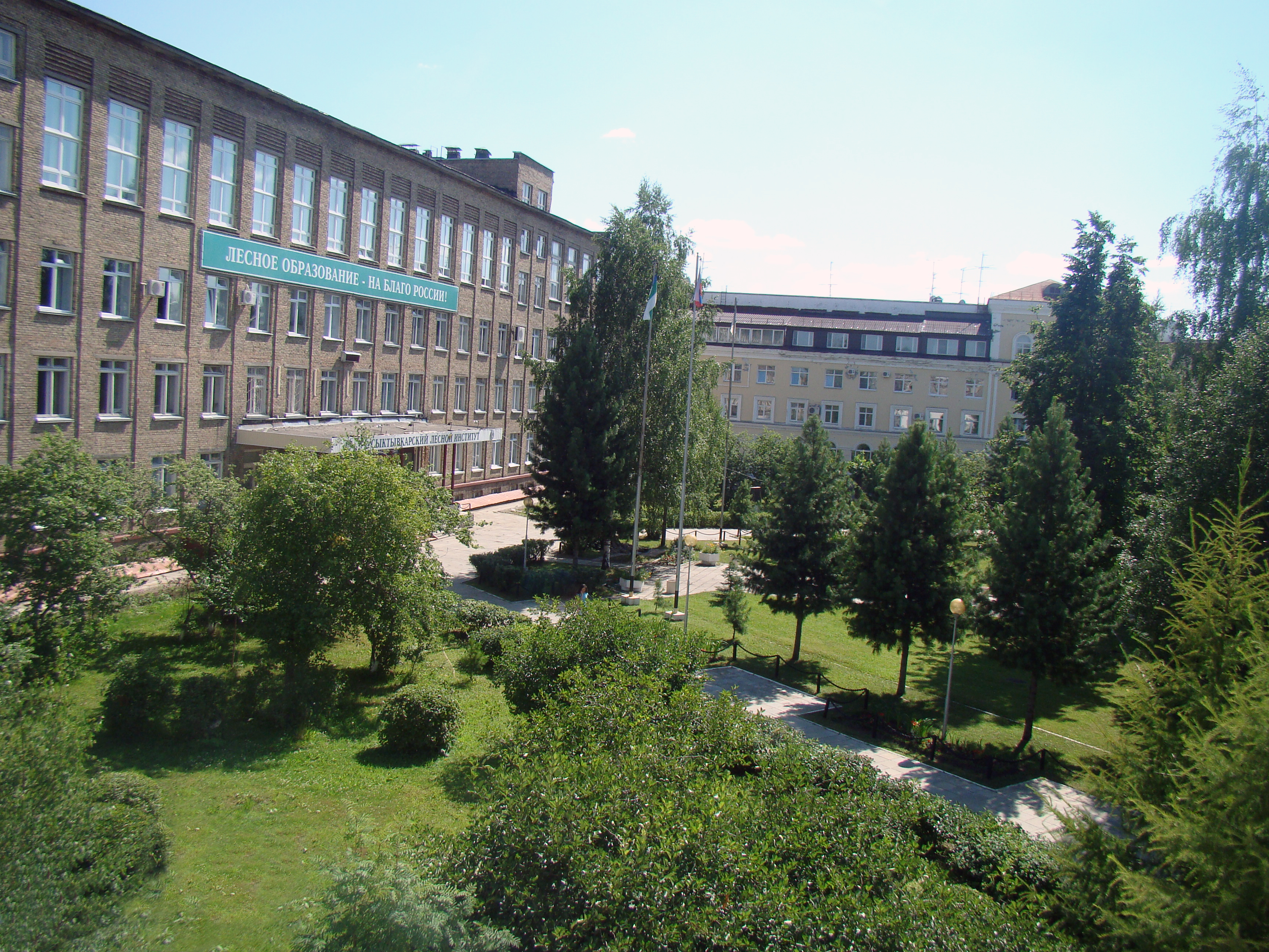 Фото СЛИ